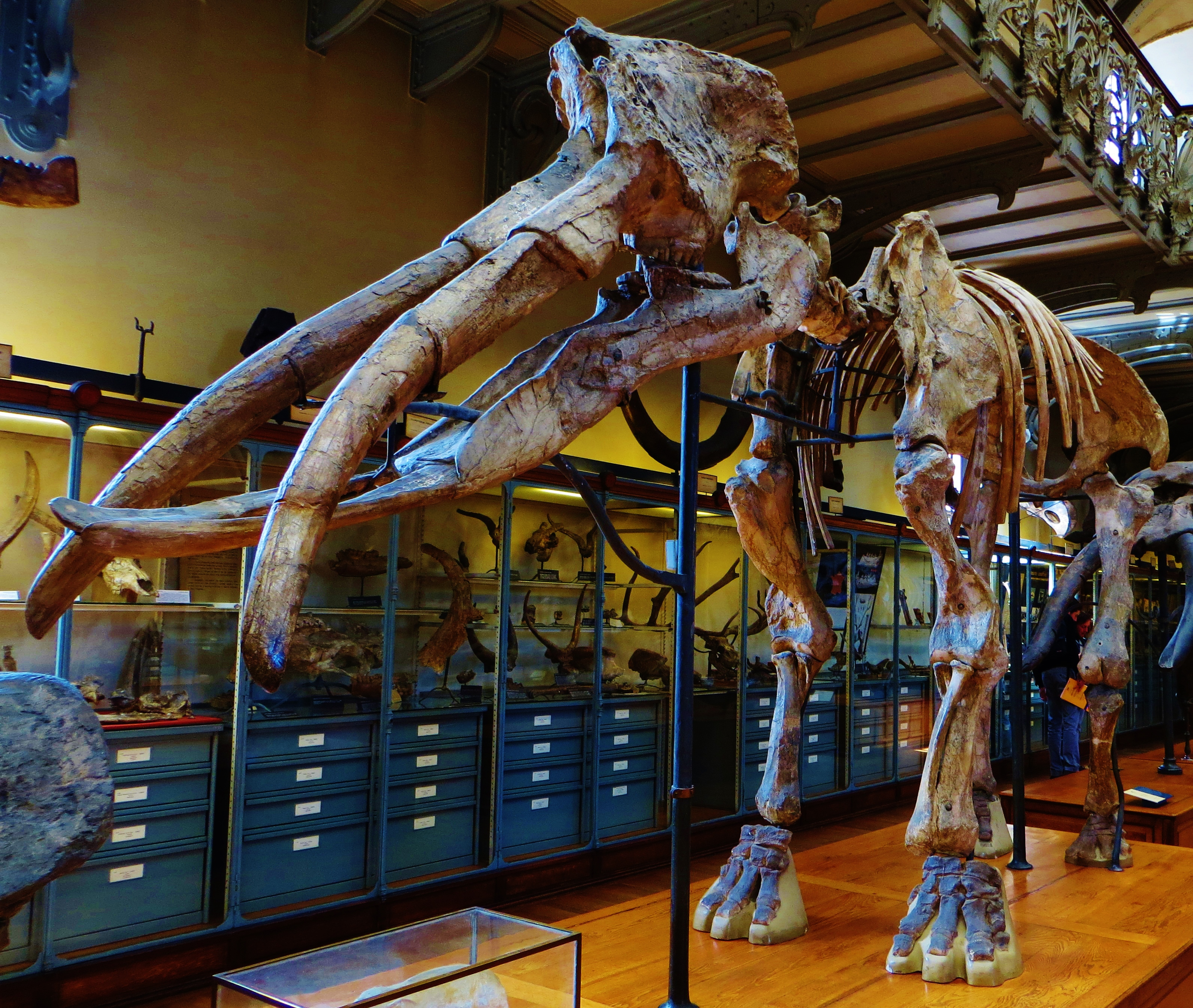 Fossil of Archaeobelodon, an extinct mammal - Took the photo at Museum Histoire Naturelle, Paris